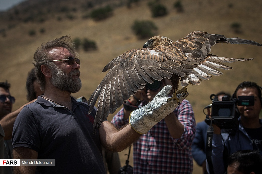 رهاسازی عقاب توسط کیهان ملکی در پارک ملی خجیر